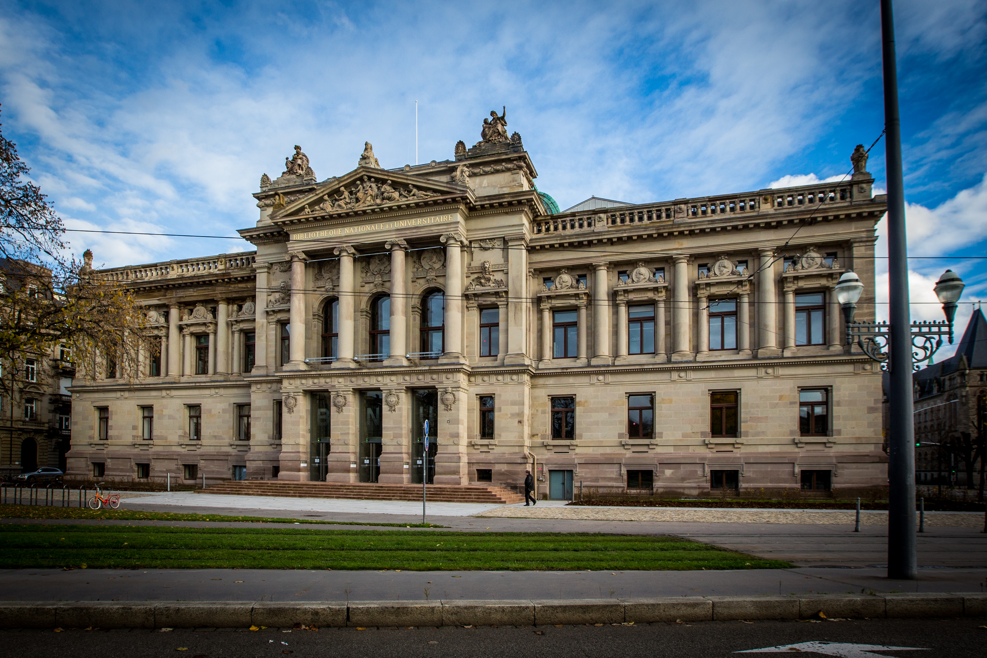 Strasbourg, la Bibliothèque nationale et universitaire après restauration du bâtiment, novembre 2014.